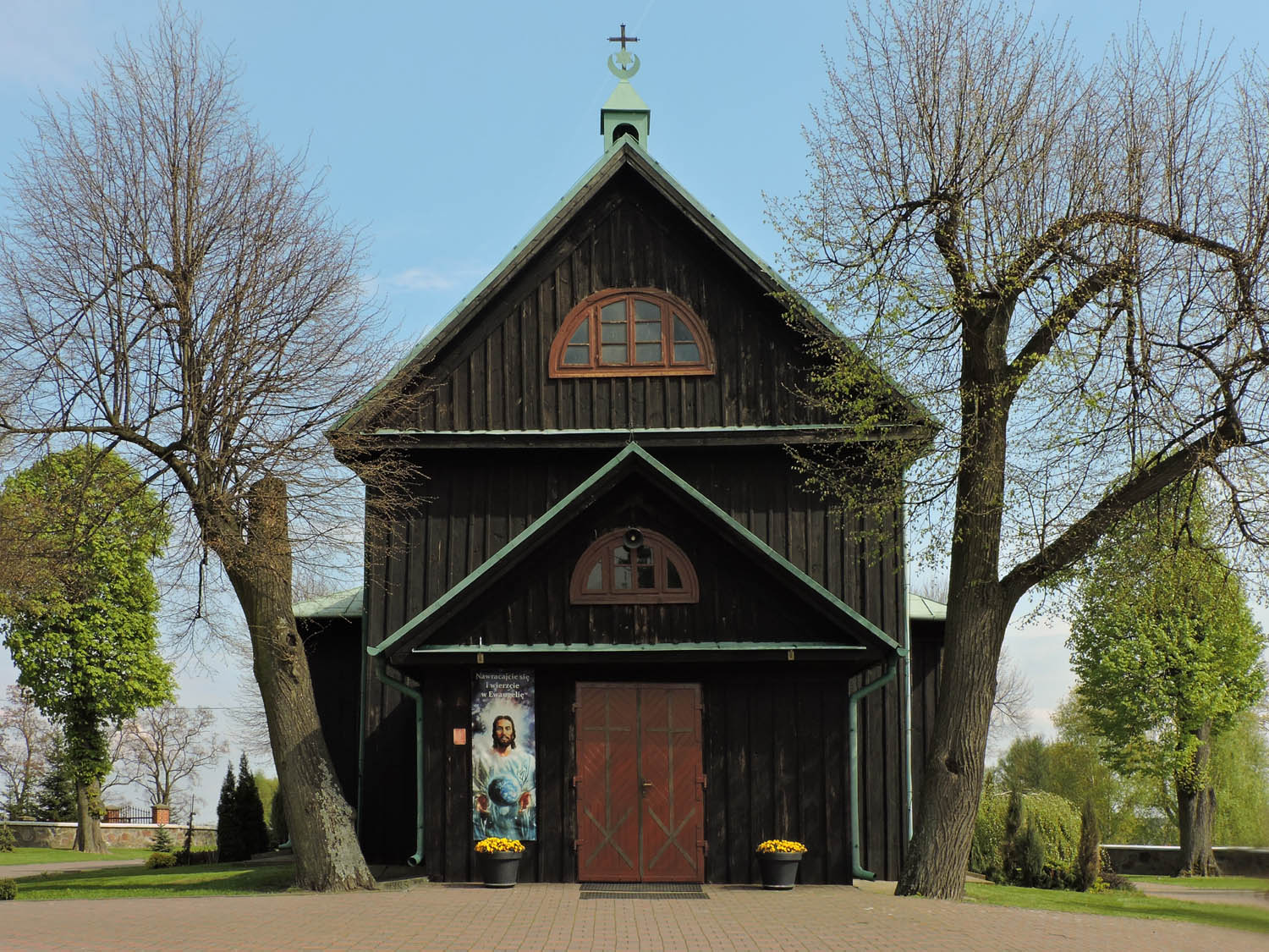 Wilków Pierwszy, kościół par. pw. św. Wawrzyńca, XIX